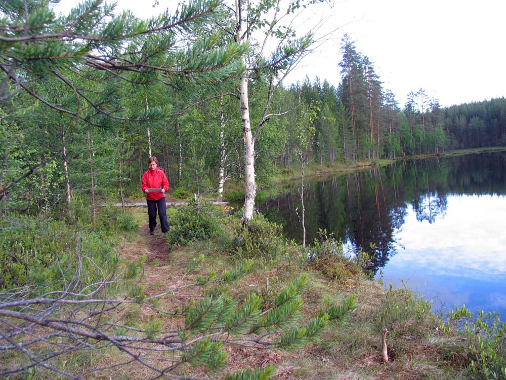 Amateur orienteering